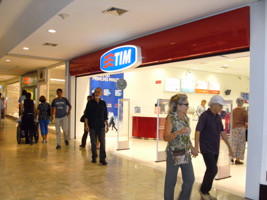 Loja da TIM no Shopping Recife.